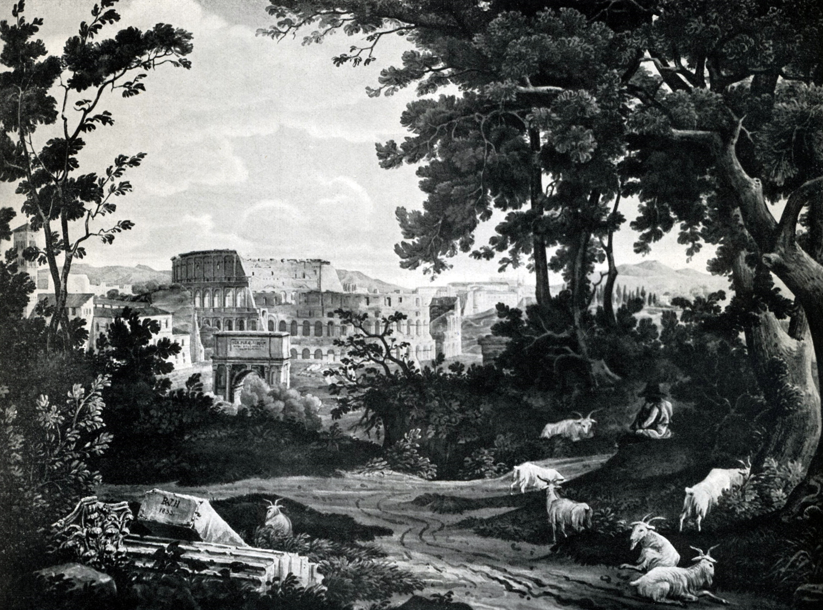 Rom, Kolosseum. Das Gemälde wurde verkauft an Frau Regierungsrat Blumenbach. Es befand sich im Jahr 1932 in der Sammlung Familie Blumenbach, Hannover. Literatur: Alexander Dorner: Hundert Jahre Kunst in Hannover 1750-1850. Kunstverein Hannover e.V. 1932 F. Bruckmann AG. München. Seiten 9, 79.